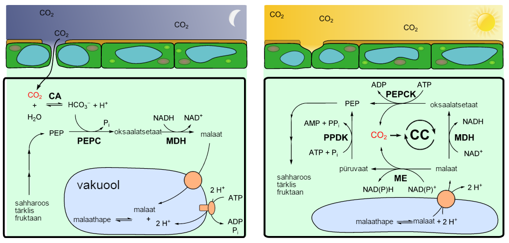 CAM tsükkel